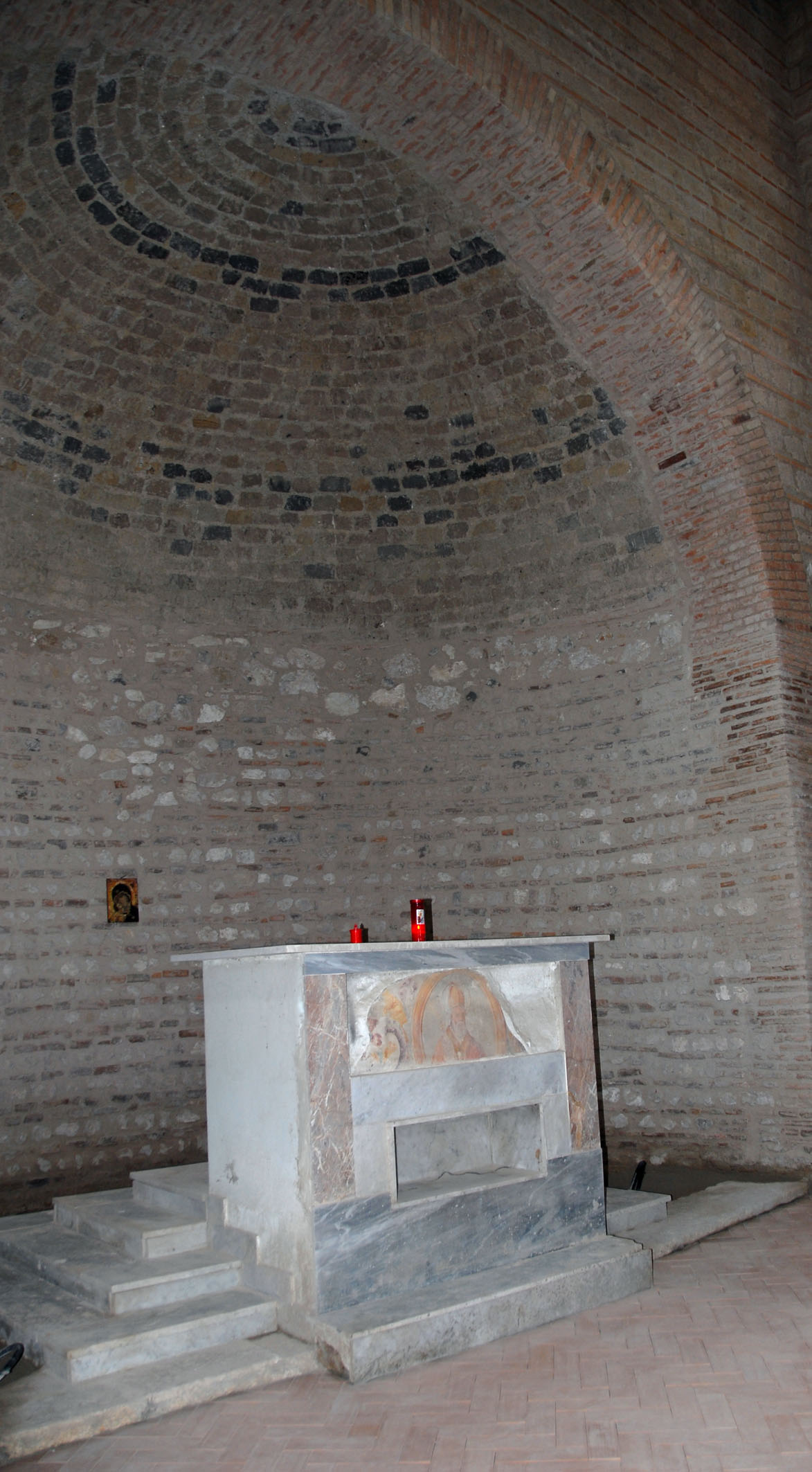 == Licenza d'uso: ==